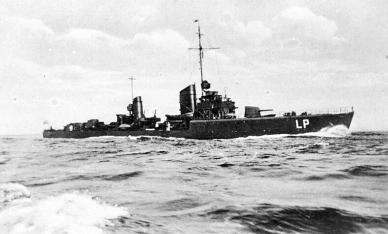 Torpedoboot "Leopard" Torpedoboot Leopard [Torpedoboote Typ 24, "Raubtier-Klasse".- "Leopard" (LP) auf See. Ansicht der Steuerbordseite]